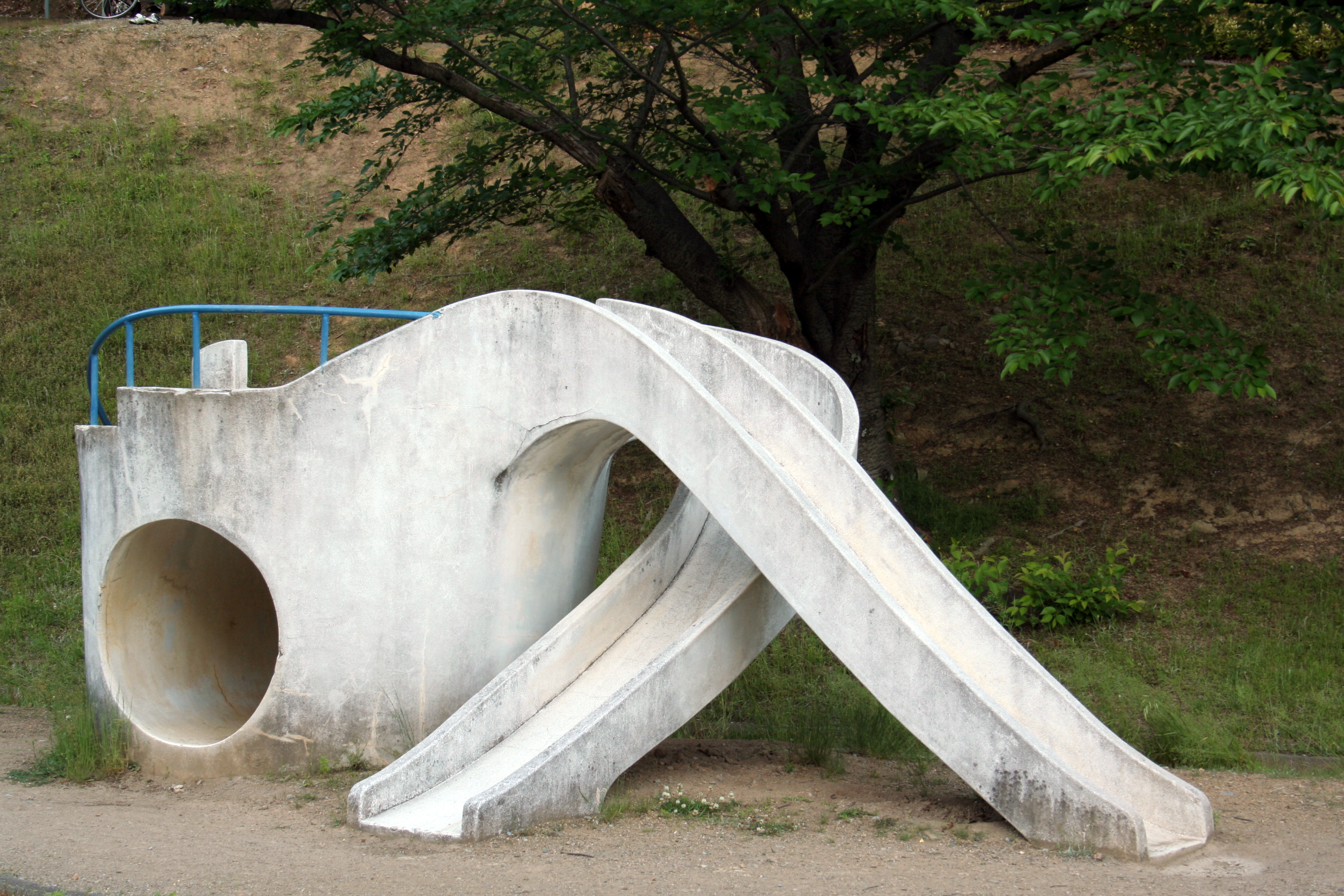 手柄山中央公園にある遊具。コンクリート製のすべり台。